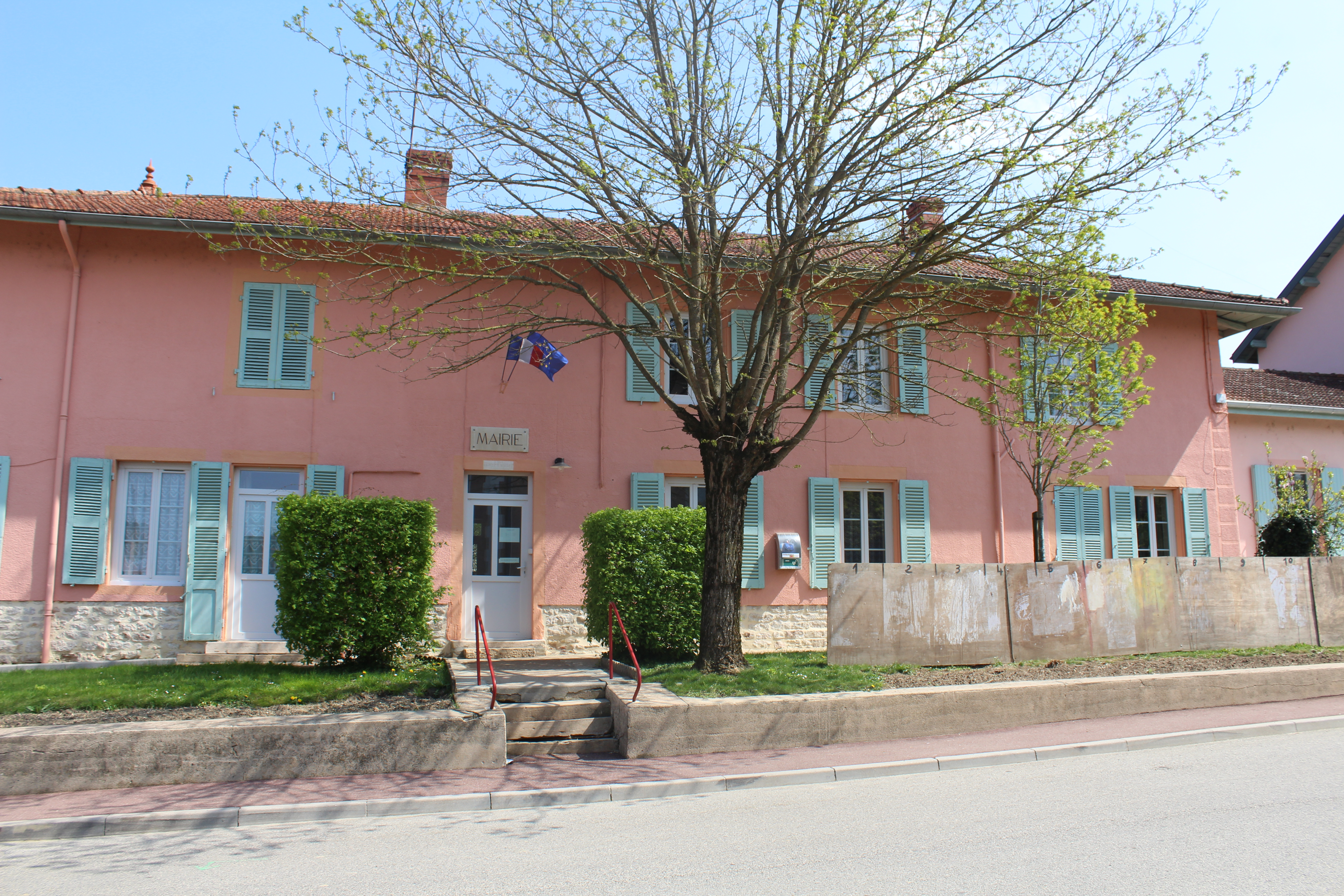 Mairie de Saint-Jean-sur-Reyssouze.